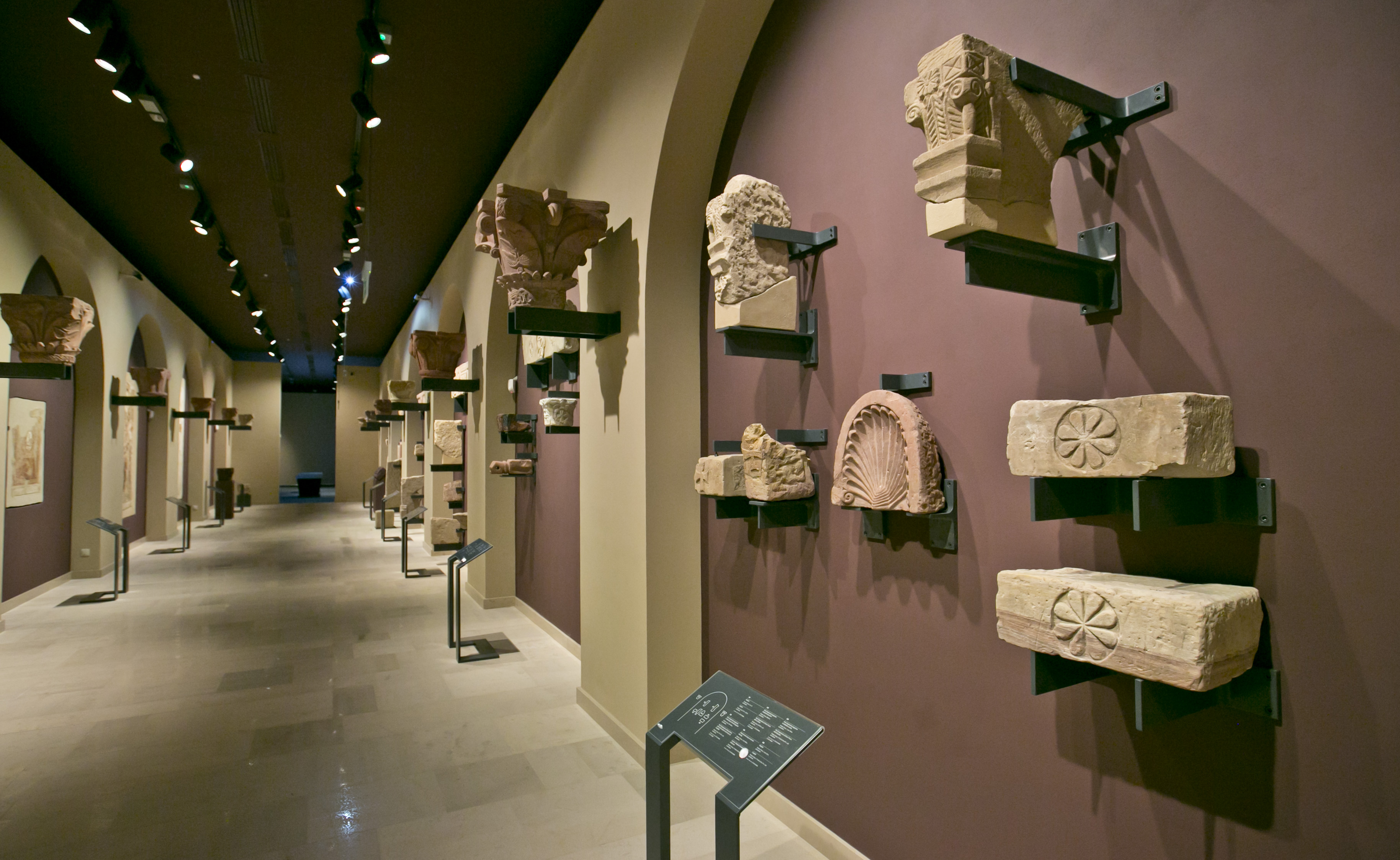 Muzeum Narodowe w Warszawie, Galeria Faras